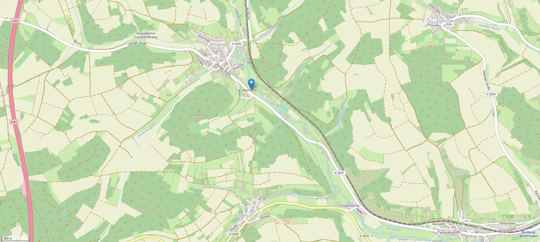 Lage des Wohnplatzes Obermühle auf der Gemarkung von Uiffingen (Boxberg)